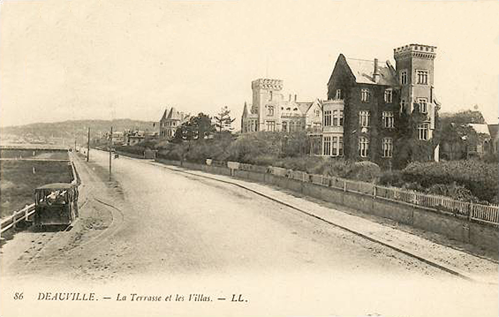 Tramway hippomobile de Deauville sur la Terrasse.